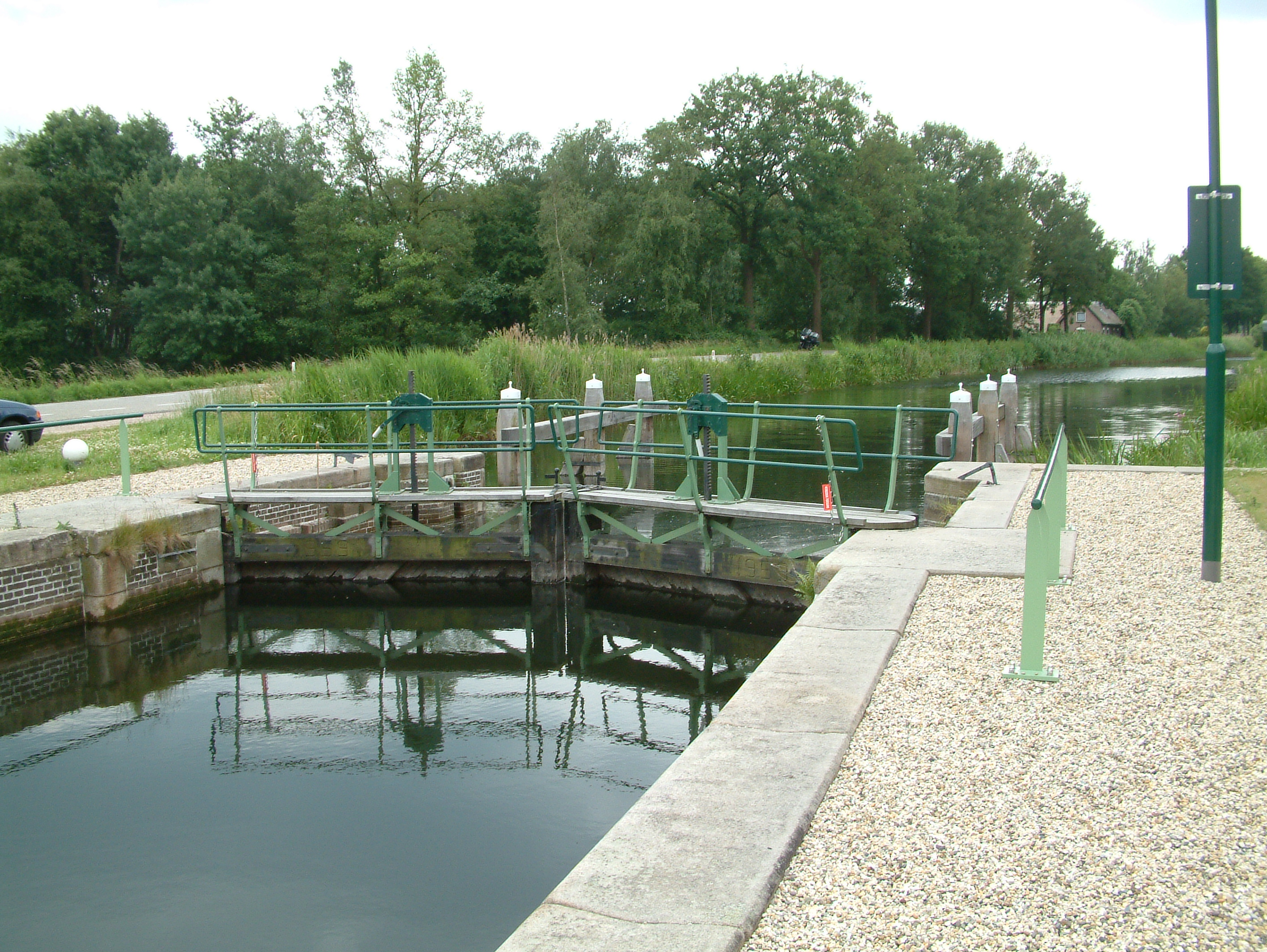 Sluis in het Apeldoorns kanaal van Dieren naar Hattem